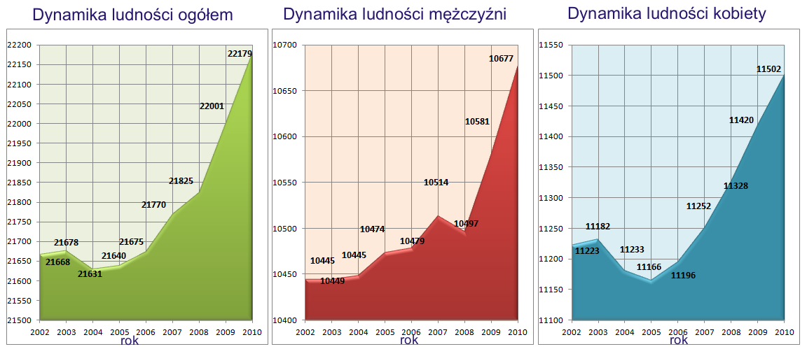 Ponowna edycja grafiki prezentującej dynamikę ludności Środy Wielkopolskiej w latach 2002-2010.